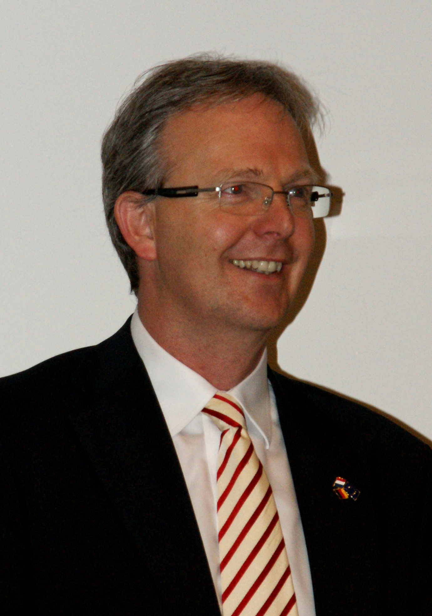 Axel Voss bei der Überreichung der Bonner Zukunftserklärung